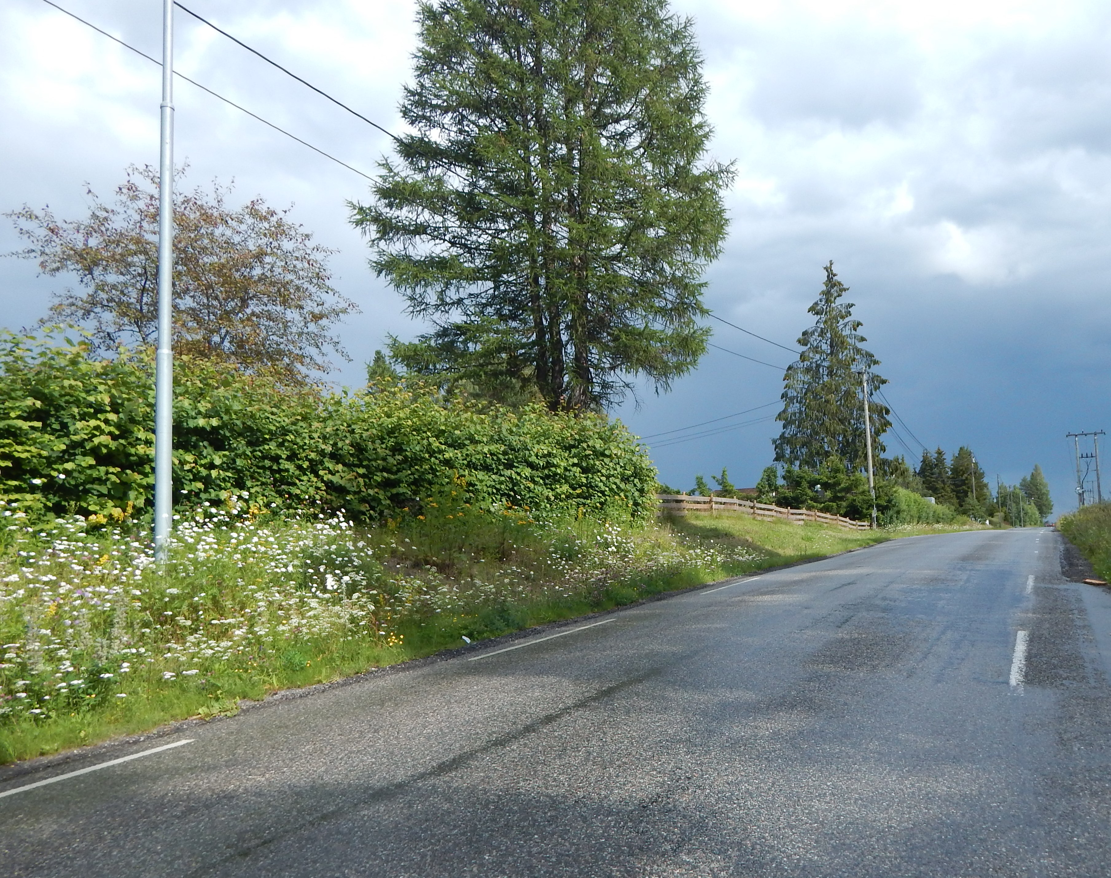 Sætrevegen, øst for E6 i Ullensaker kommune